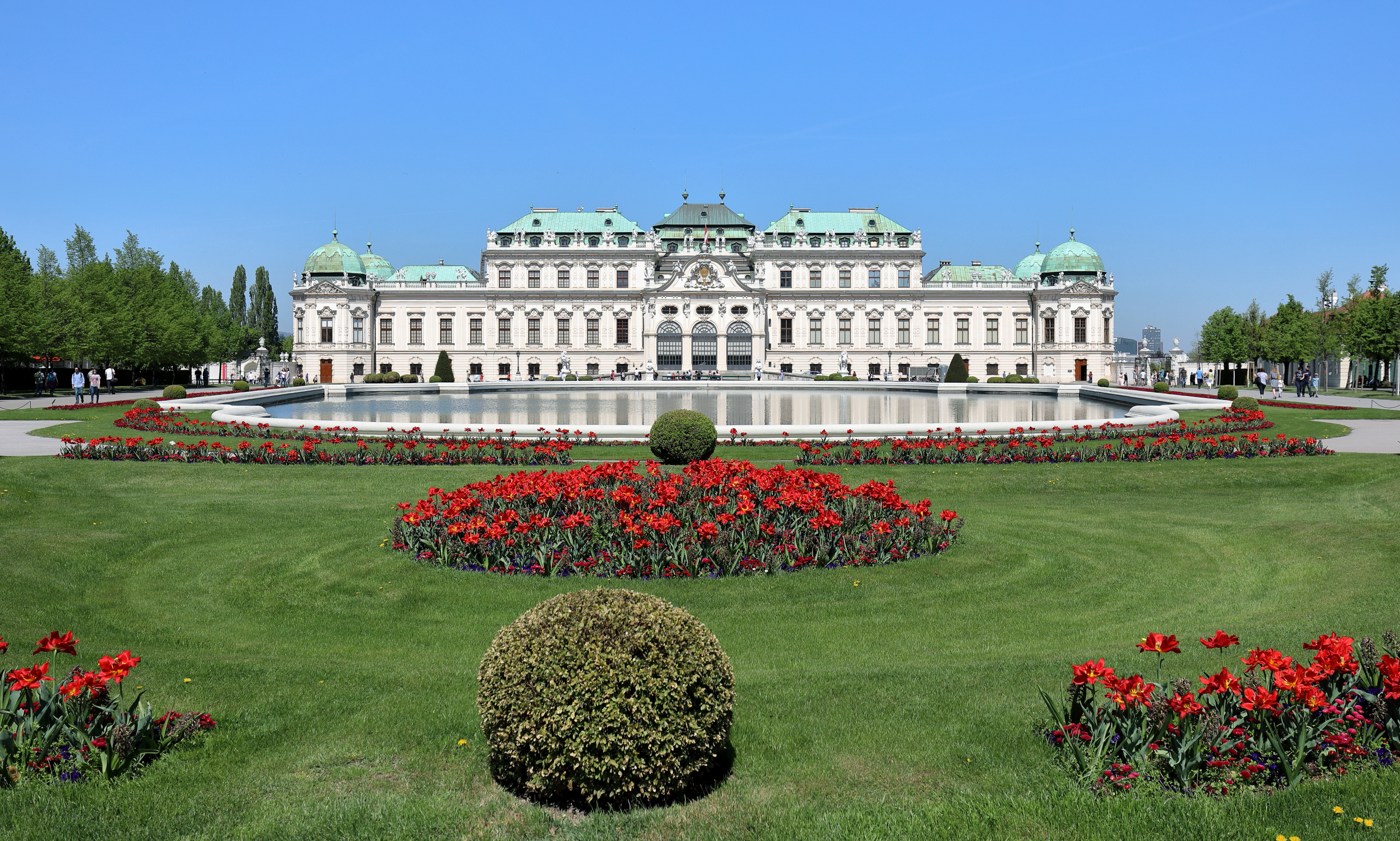 Südansicht des oberen Belvederes im 3. Wiener Gemeindebezirk Landstraße.Die barocke Schlossanlage ließ Prinz Eugen von Savoyen nach Plänen von Johann Lukas von Hildebrandt errichten. Das obere Belvedere diente ihm als Repräsentations- und Festschloss und wurde von 1717 bis 1723 gebaut. Zuvor ließ er von 1712 bis 1716 das untere Belvedere als Sommerwohnsitz errichten. Aktuell (2018) wird das untere Belvedere als auch das obere von der Österreichischen Galerie Belvedere genutzt.